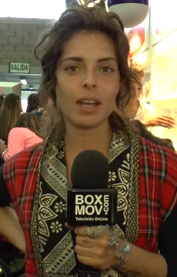 Camila Zarate en 2015